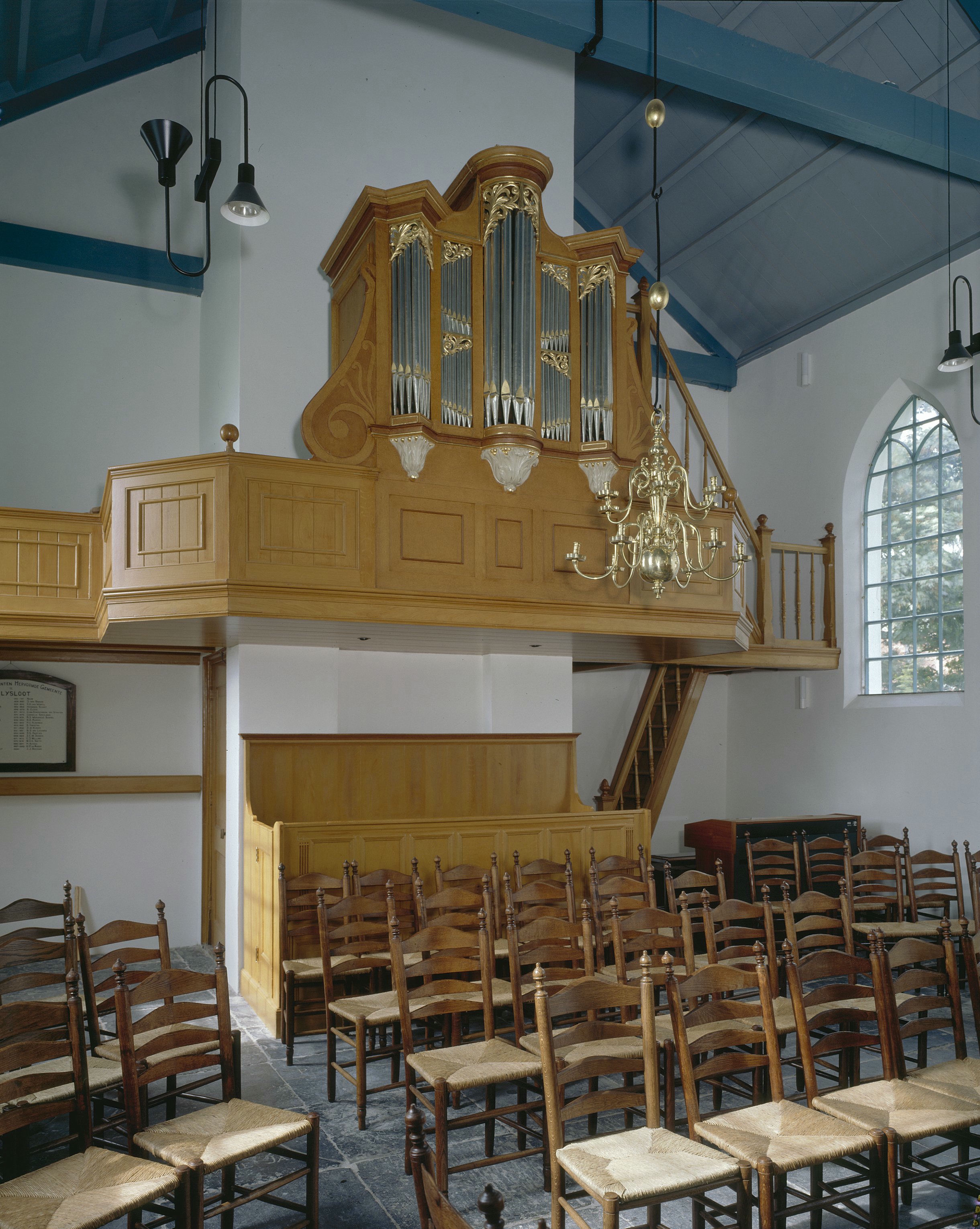 Nederlands Hervormde Kerk: Interieur, aanzicht orgel, orgelnummer 703 (opmerking: Gefotografeerd voor Het Historische Orgel in Nederland 1726-1769, bladzijde 57)